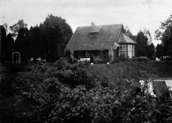 Foto. Villa van de heer Loeff in Nongkadjadjar, Oost-Java.